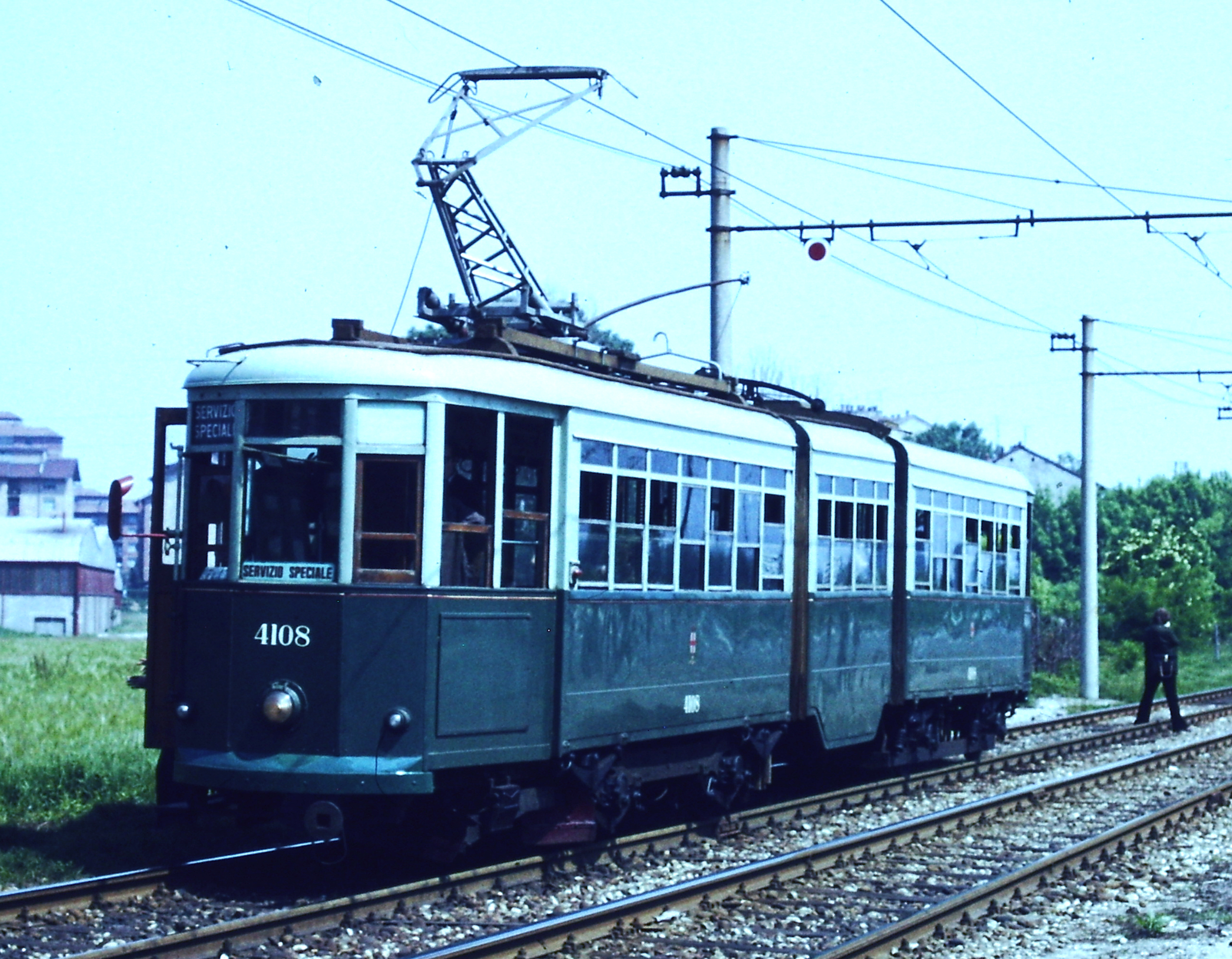 Vettura tranviaria n. 4108 dell'ATM di Milano in corsa lungo via dei Missaglia per un servizio speciale.